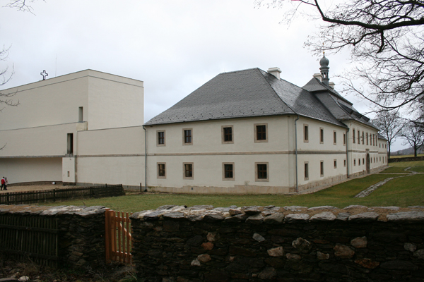 Klášter Nový Dvůr nedaleko Dobré Vody u Toužimi vznikl úpravou barokního dvora. Klášter bratří trapistů leží v okrese Karlovy Vary, Česká republika.